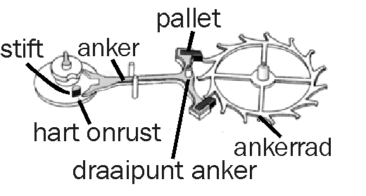 zwitsers echappement voor raderuurwerken